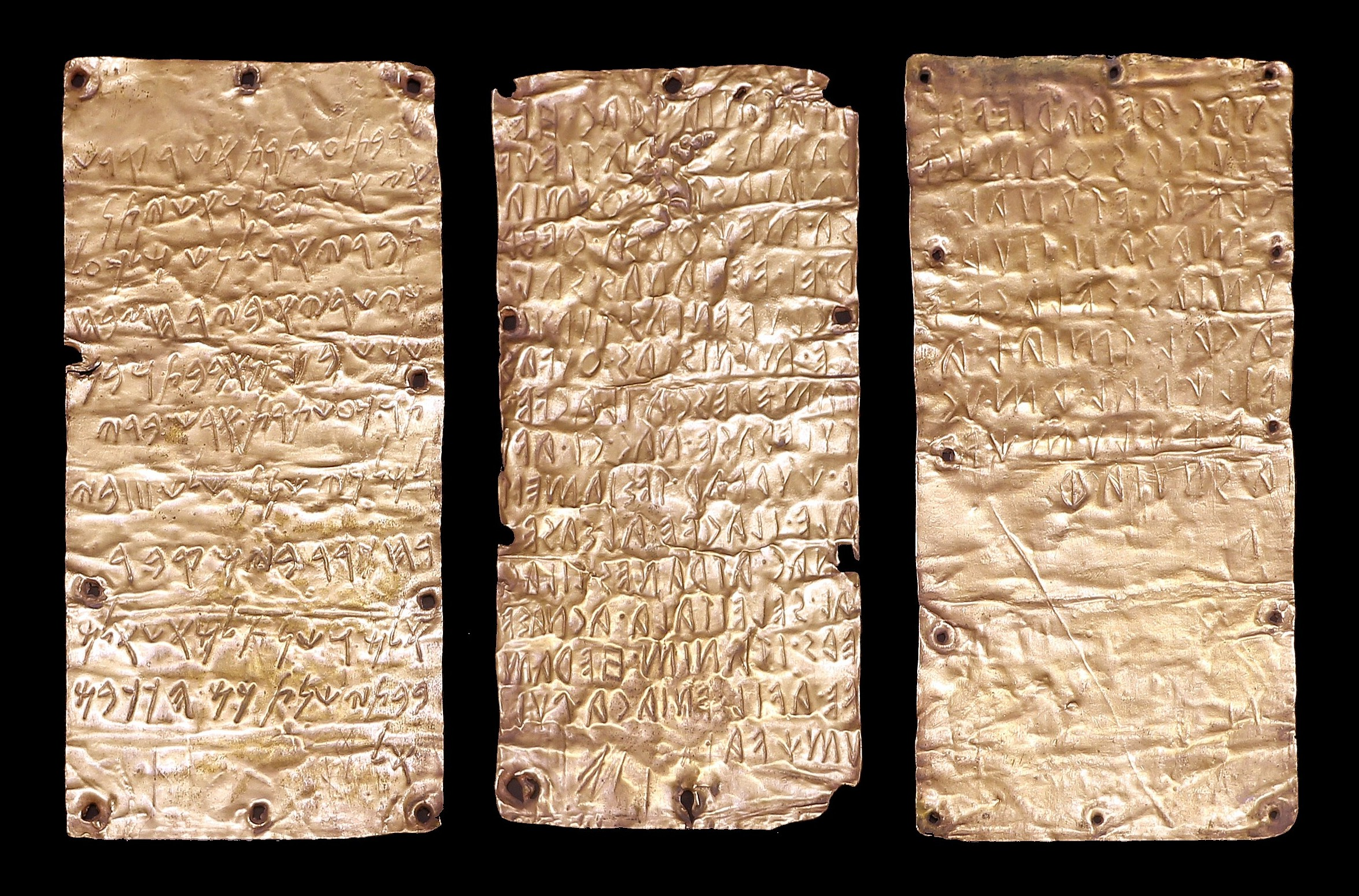 Villa Giulia (Rome) This is a photo of a monument which is part of cultural heritage of Italy.